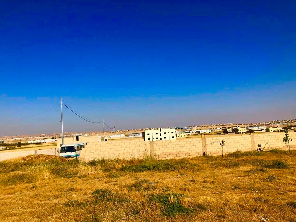 صورة لأحد المباني التي يحدها منطقة زراعية في منطقة رجم الشامي الأردنية